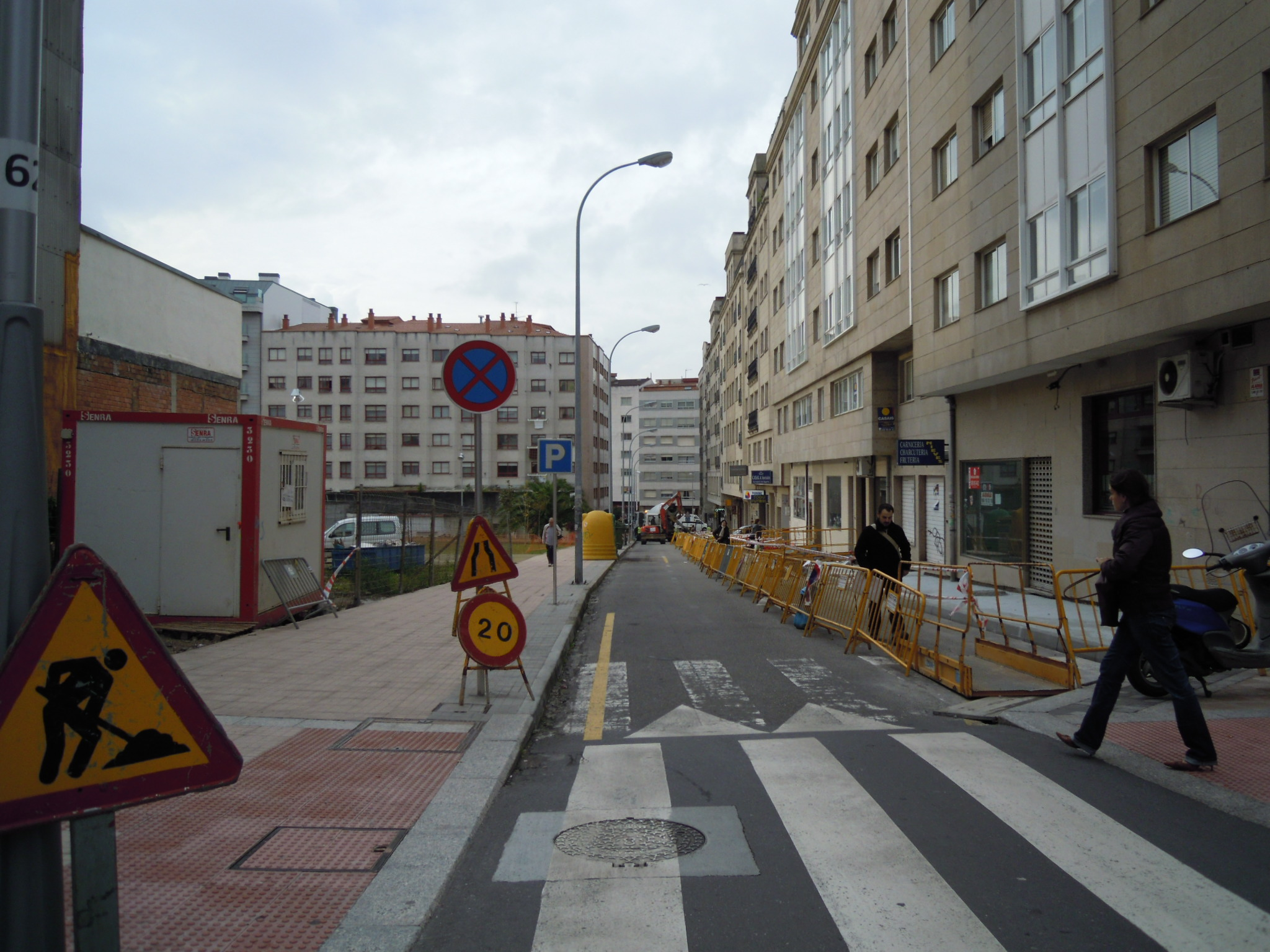 Rúa de Xosé Filgueira Valverde, no barrio da Eiriña de Pontevedra, entre as rúas de Joaquín Costa e Eduardo Pondal